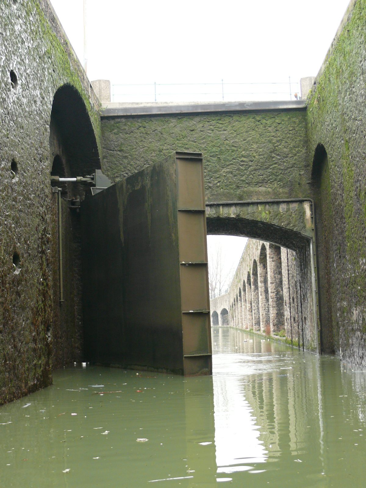 L'écluse du Pont de Flandre (1ère écluse du Canal Saint-Denis à Paris) rattrape une dénivellation de 10 m. Ici, vue de la porte d'aval du Grand bief.